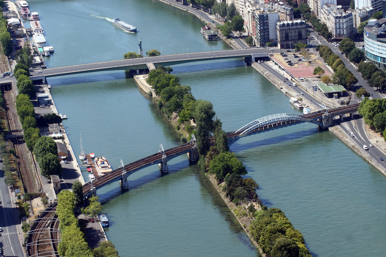 Île aux Cygnes